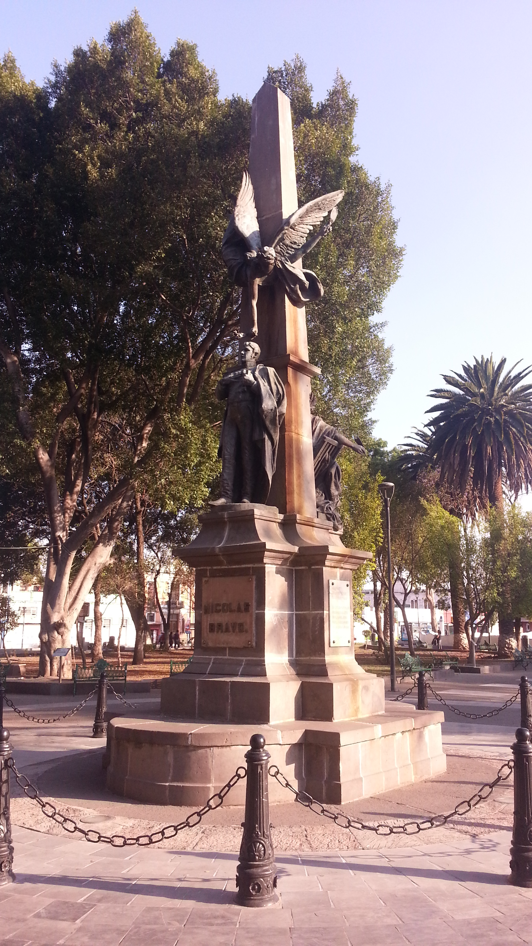 Estatua de Nicolás Bravo ubicada en el Paseo de la Independencia (Paseo Bravo) en la ciudad de Puebla de Zaragoza, Puebla, México.